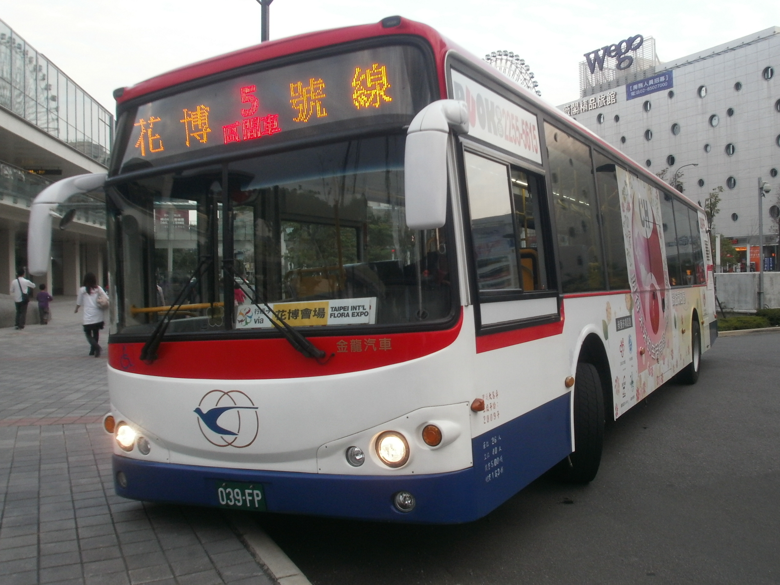 光華巴士大客車039-FP，行駛台北聯營公車花博5號線區間車，停靠台北捷運劍南路站。